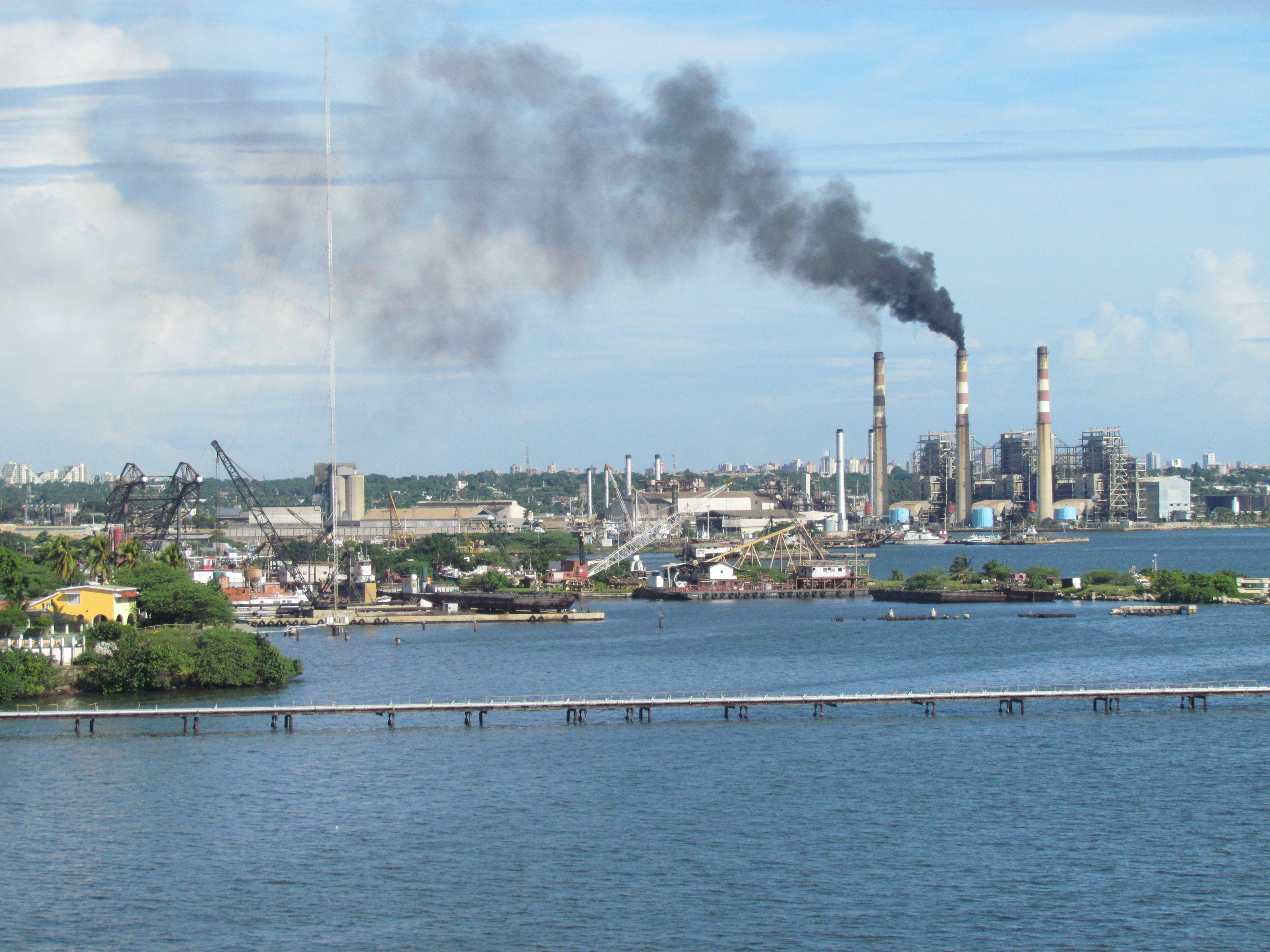 Planta Termoeléctrica en Maracaibo, Venezuela